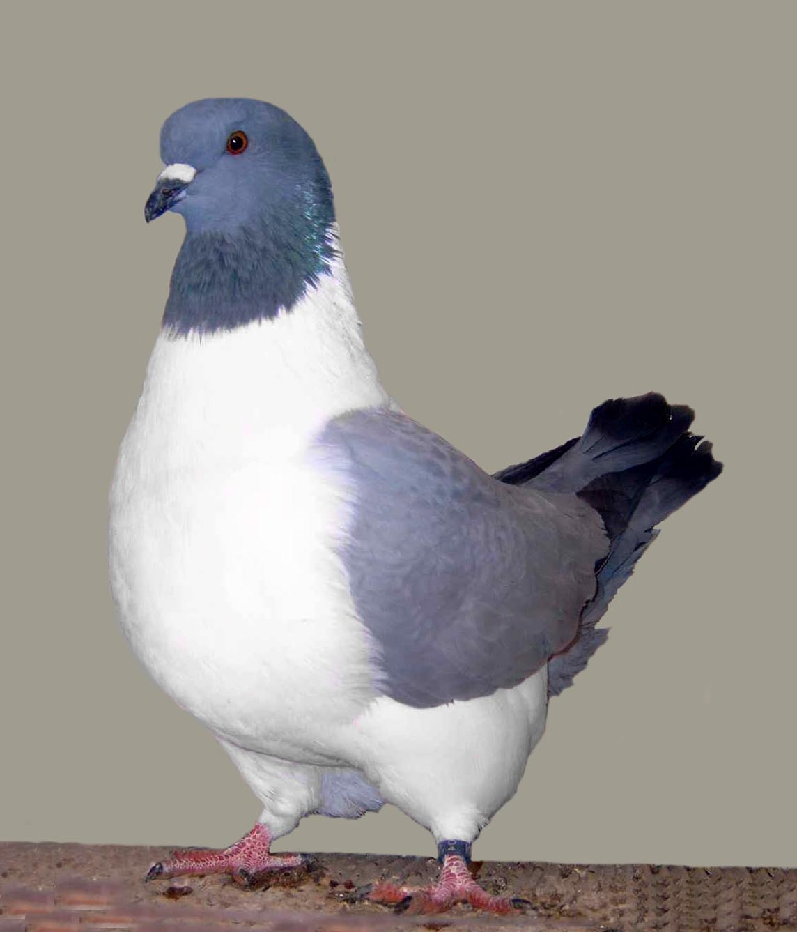 Strasser (Barless Blue)